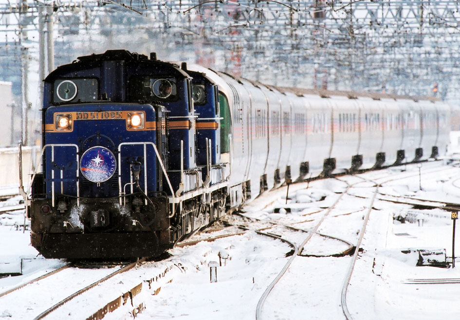 JR北海道 DD51 1095けん引 寝台特急カシオペア